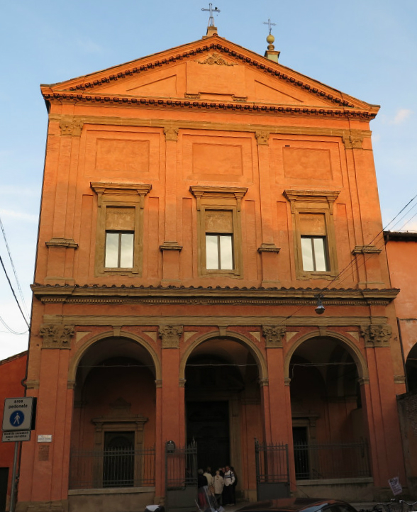 Facciata della chiesa di Santa Cristina della Fondazza a Bologna, opera dell'architetto Giulio della Torre